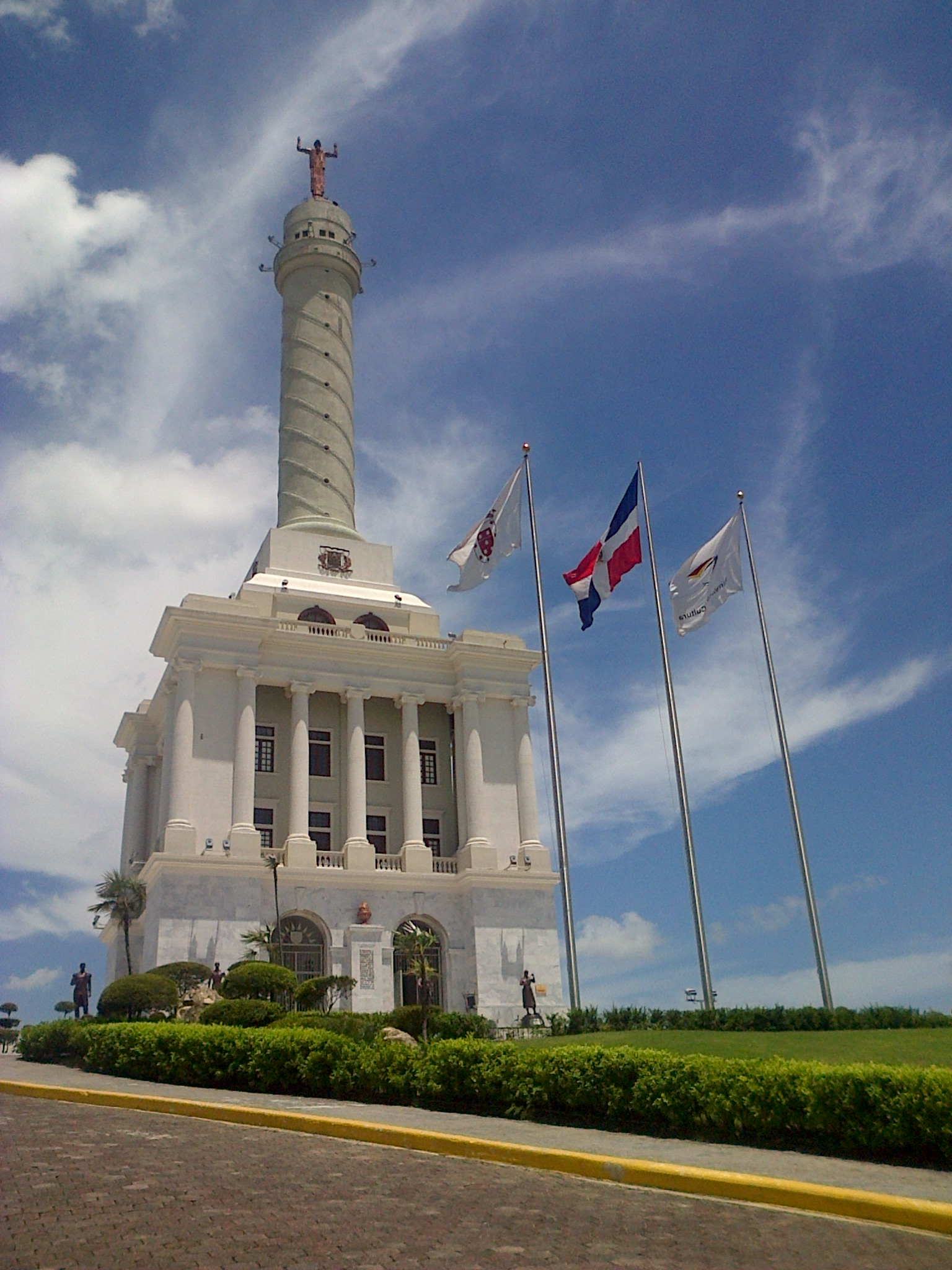 Monumento de Santiago